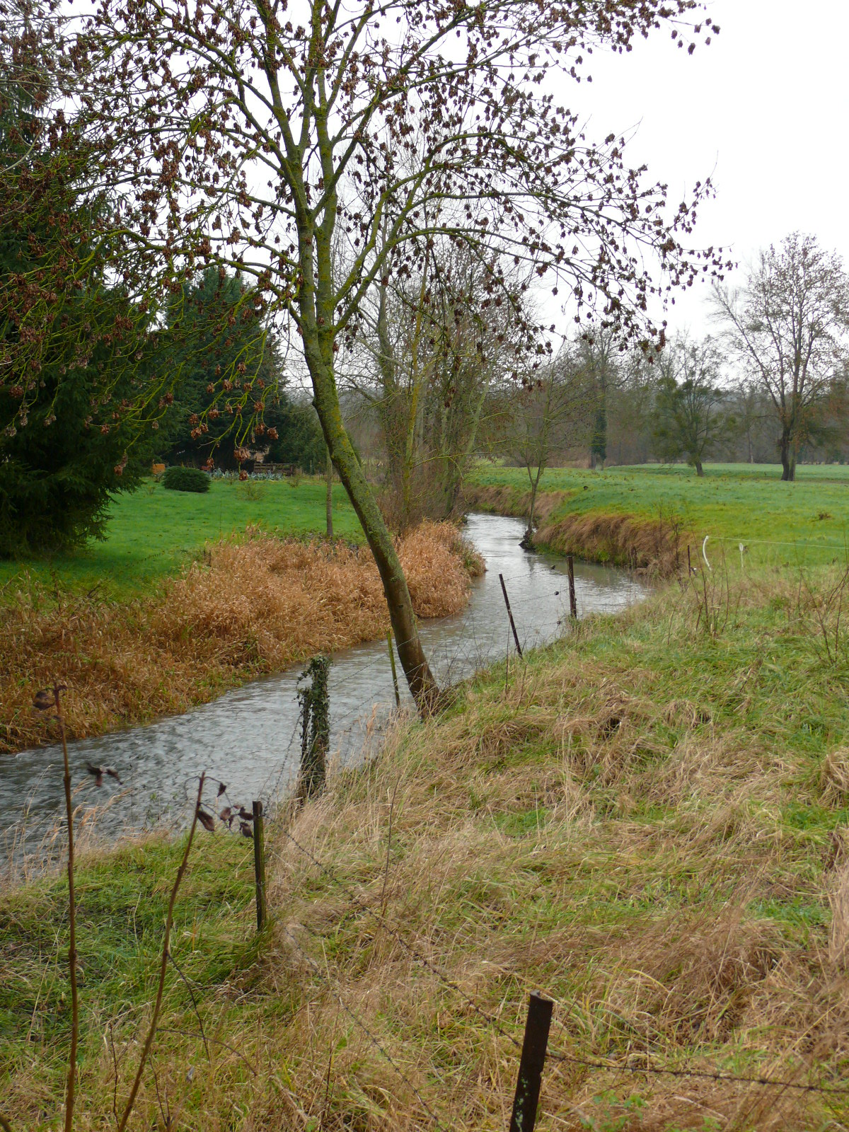 La Celle à Croissy-sur-Celle (Dans la Somme, la rivière est appelée la Selle)